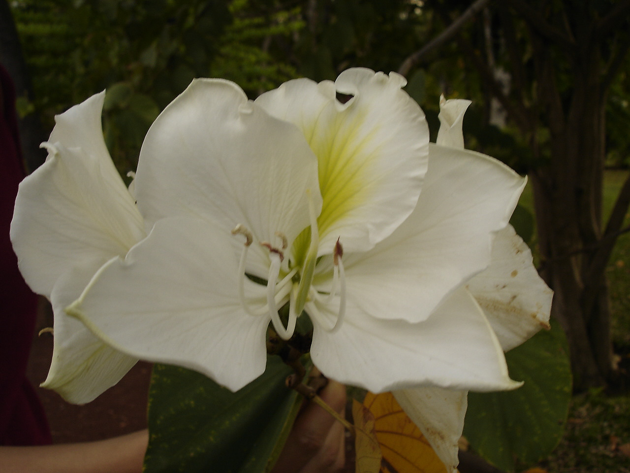 Description: Bauhinia variegata candida dans le Jardin de l'Etat, novembre 2004, Saint-Denis de la Réunion Source:Bouba